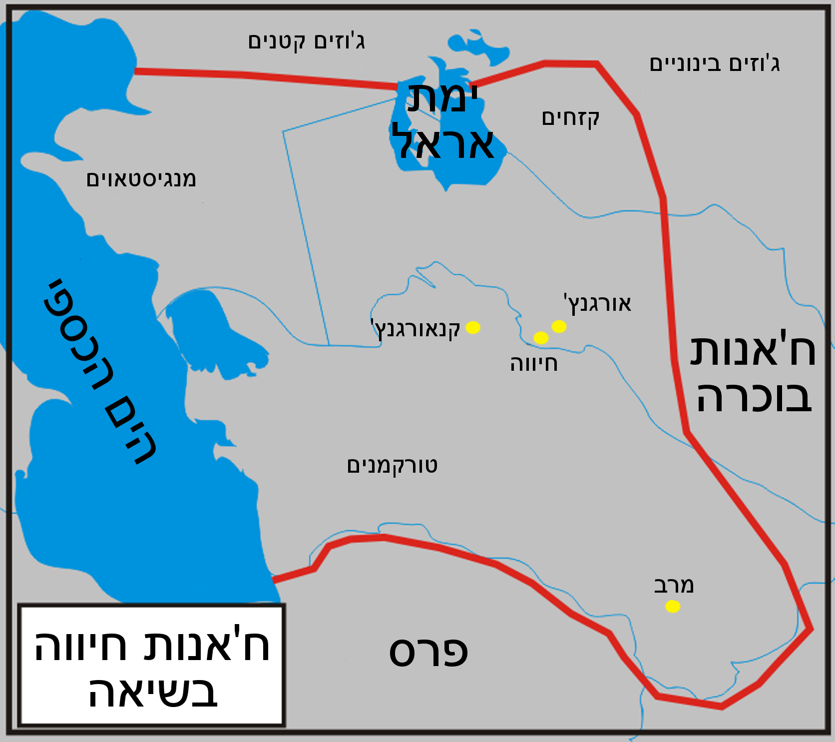 Карта Хивинского ханства